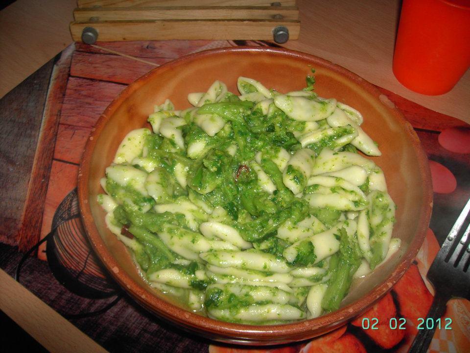 Un piatto della tradizione: Capont e Vrucc'l